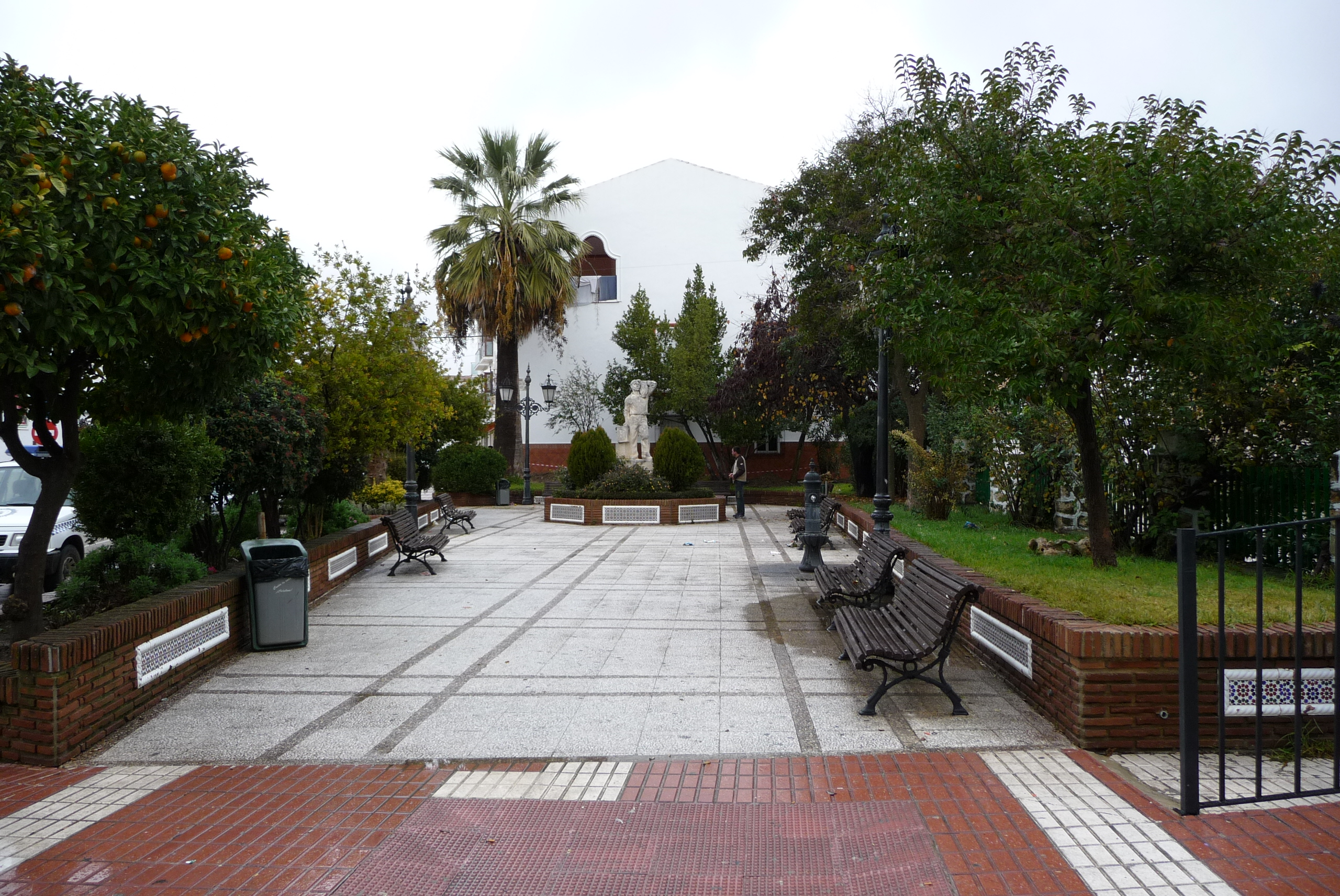 Alcala del Valle (Andalusia, Spain). Monumento al emigrante